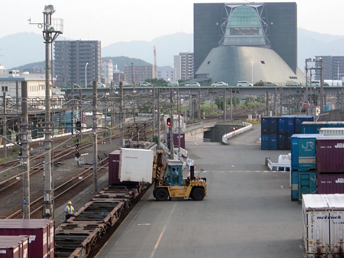 静岡市駿河区池田、JR貨物 静岡貨物駅。下り着発荷役線での荷役作業。フォークリフトの先に電気機関車が見え隠れしている。後方の橋は、長沼大橋。背後に、静岡県コンベンションアーツセンター（グランシップ）が見える。